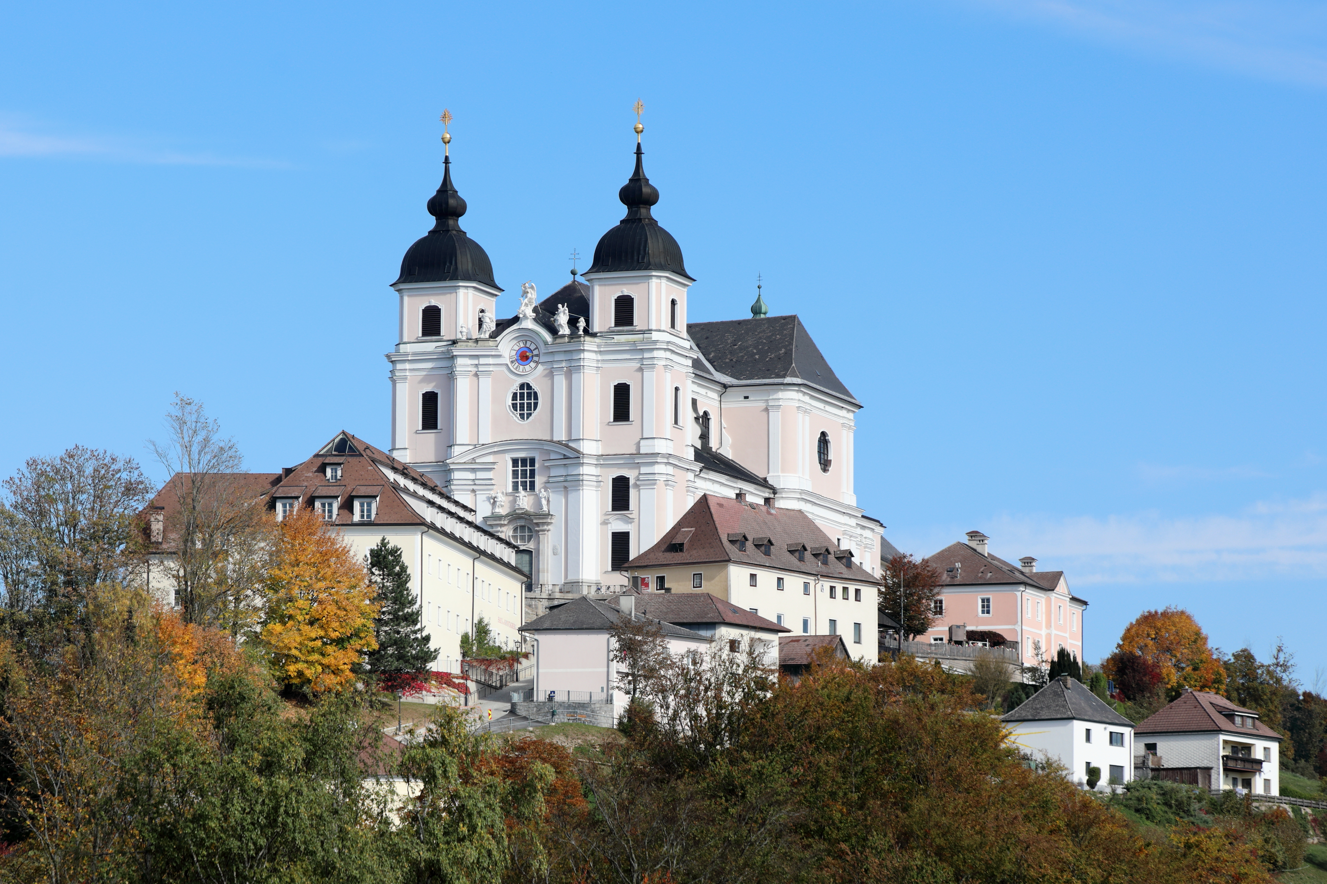 Westsüdwestansicht der Kirchensiedlung Sonntagberg auf einem 712 Meter hohen Bergrücken mit der Basilika zur Heiligen Dreifaltigkeit und zum hl. Michael in der niederösterreichischen Marktgemeinde Sonntagberg.Die barocke Basilika in weithin sichtbarer, dominierender Lage zählt zu den markanten Wahrzeichen des Mostviertels. Sie wurde von 1706 bis 1732 nach Plänen der Barockbaumeistern Joseph Munggenast (1706–1717) und Jakob Prandtauer (1718–1732) errichtet und 1729 geweiht.